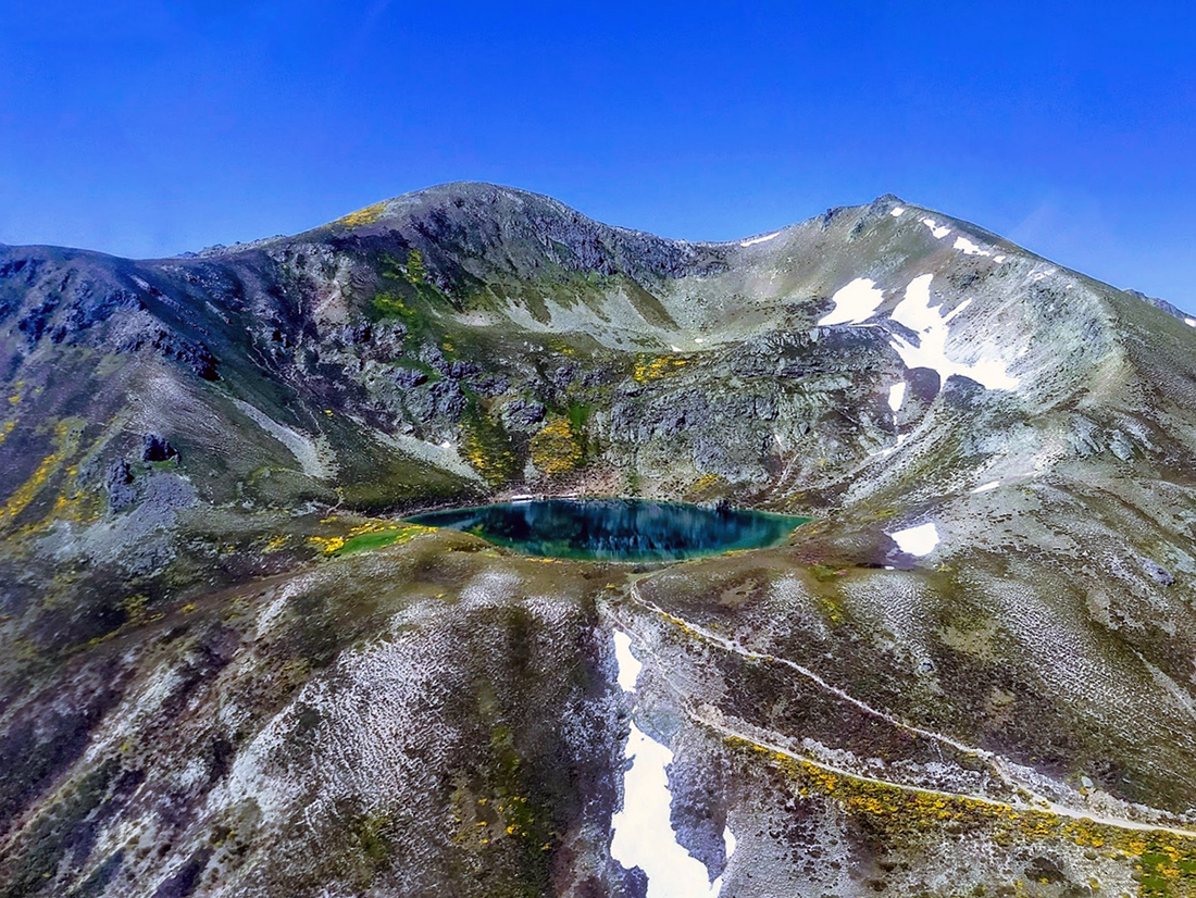 Lago de alta montaña de origen glacial